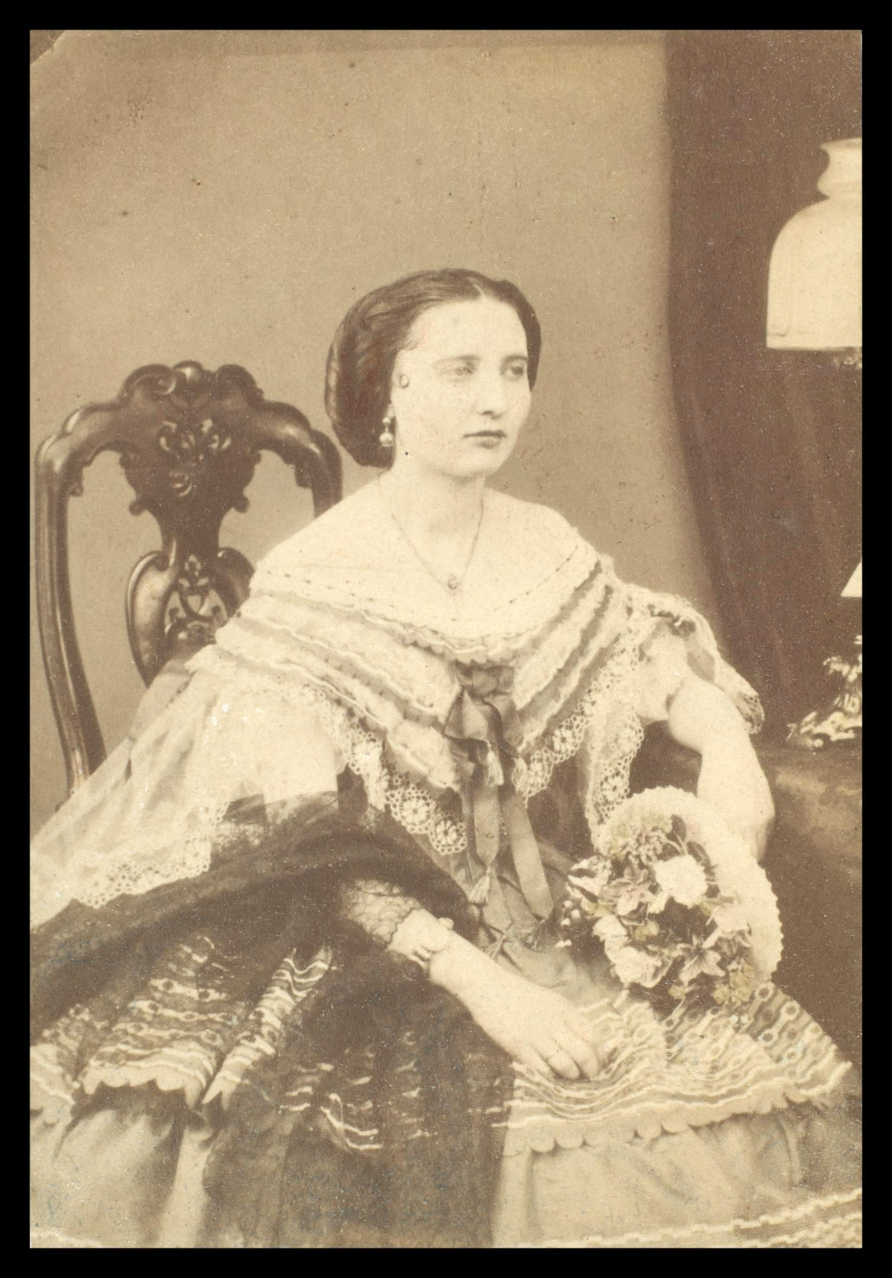 Photograph by Henry Hering